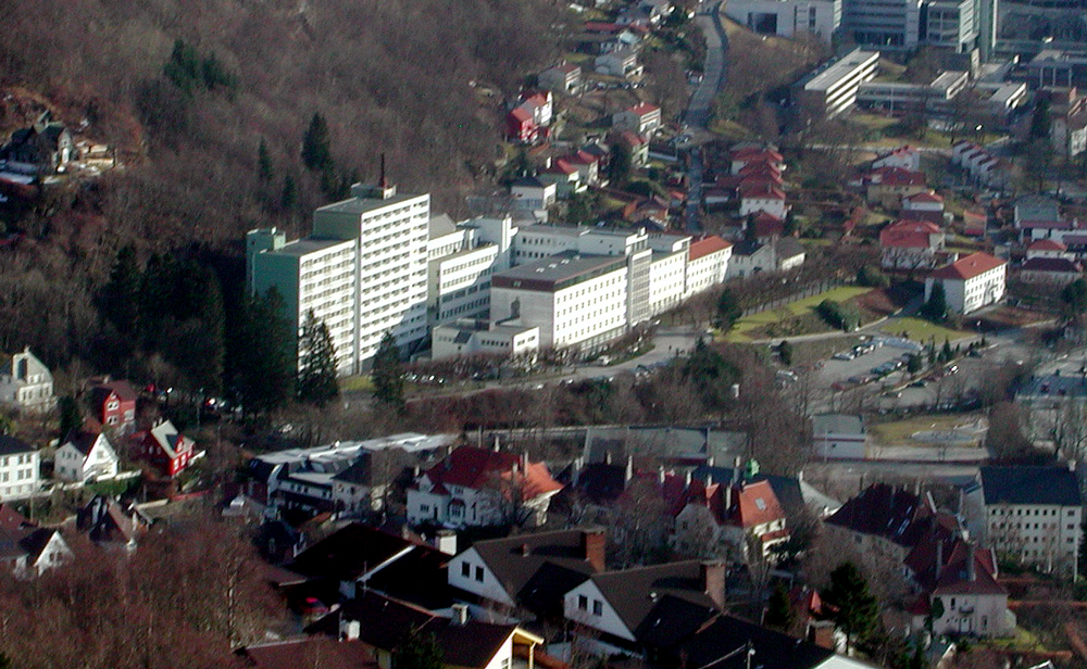 48 måls tomt (Haraldsplass) eid av Stiftelsen Bergen Diakonissehjem.